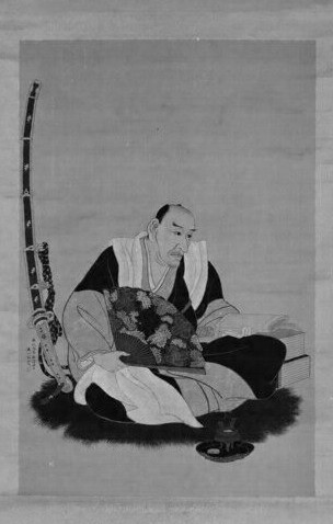 山本北山とされる肖像画。